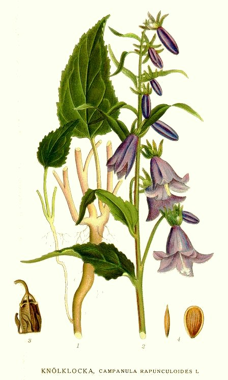 Original Description Knölklocka, Campanula rapunculoides L.